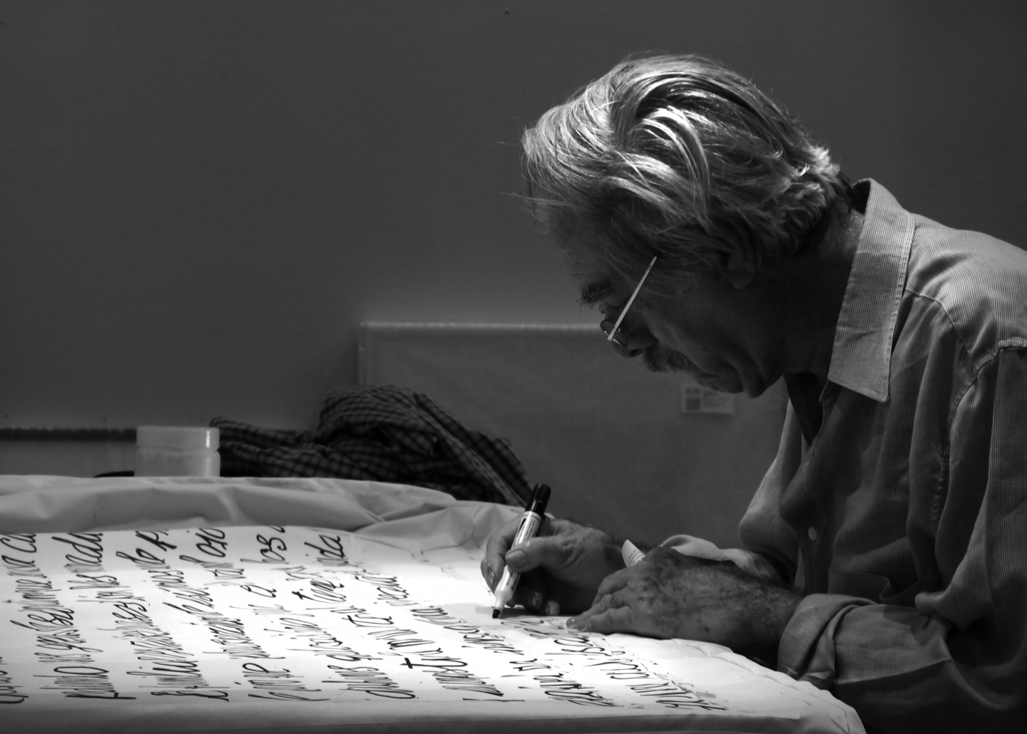 Registro del proceso de creción de una obra plastica unica intervencion de un forro para piano